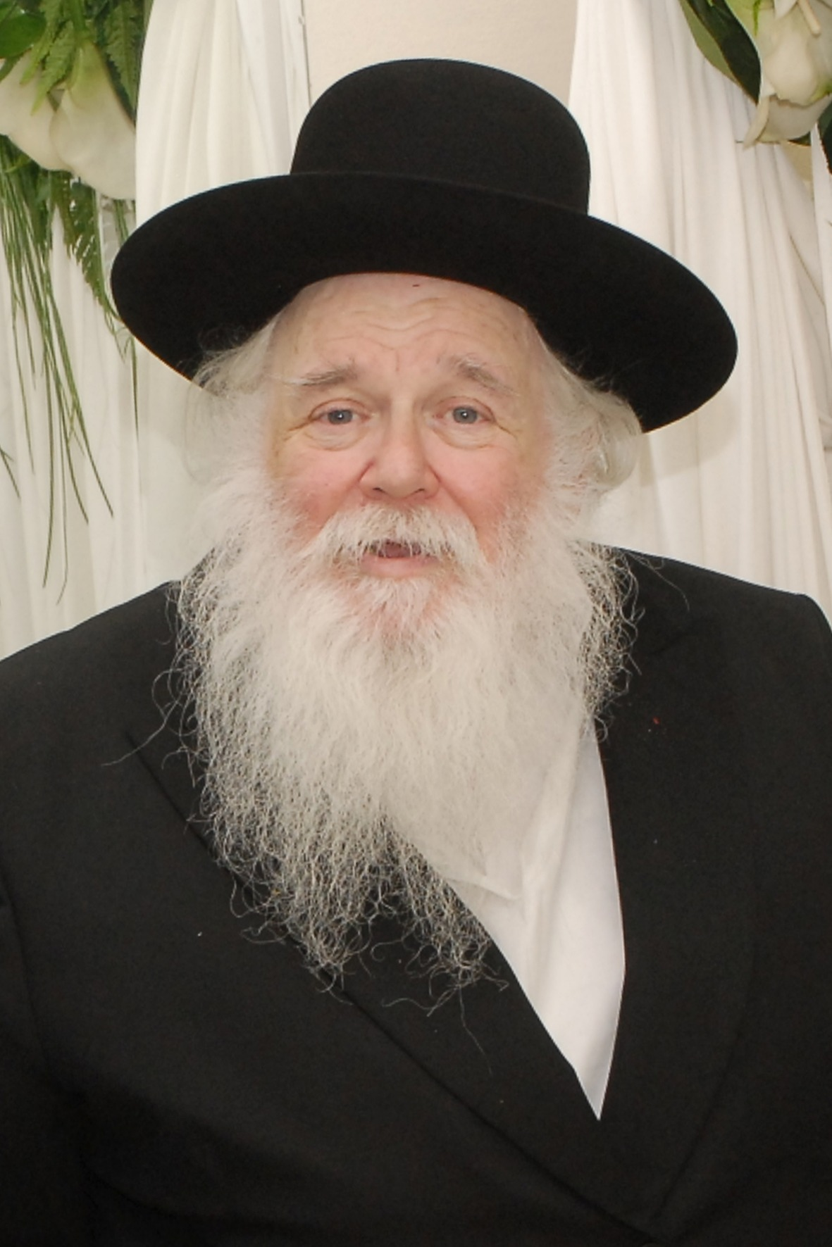 משה מרדכי הלוי שולזינגרהיה תלמיד חכם ורב חרדי-ליטאי, מחבר סדרת ספרי משמר הלוי